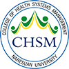 วิทยาลัยการจัดการระบบสุขภาพ